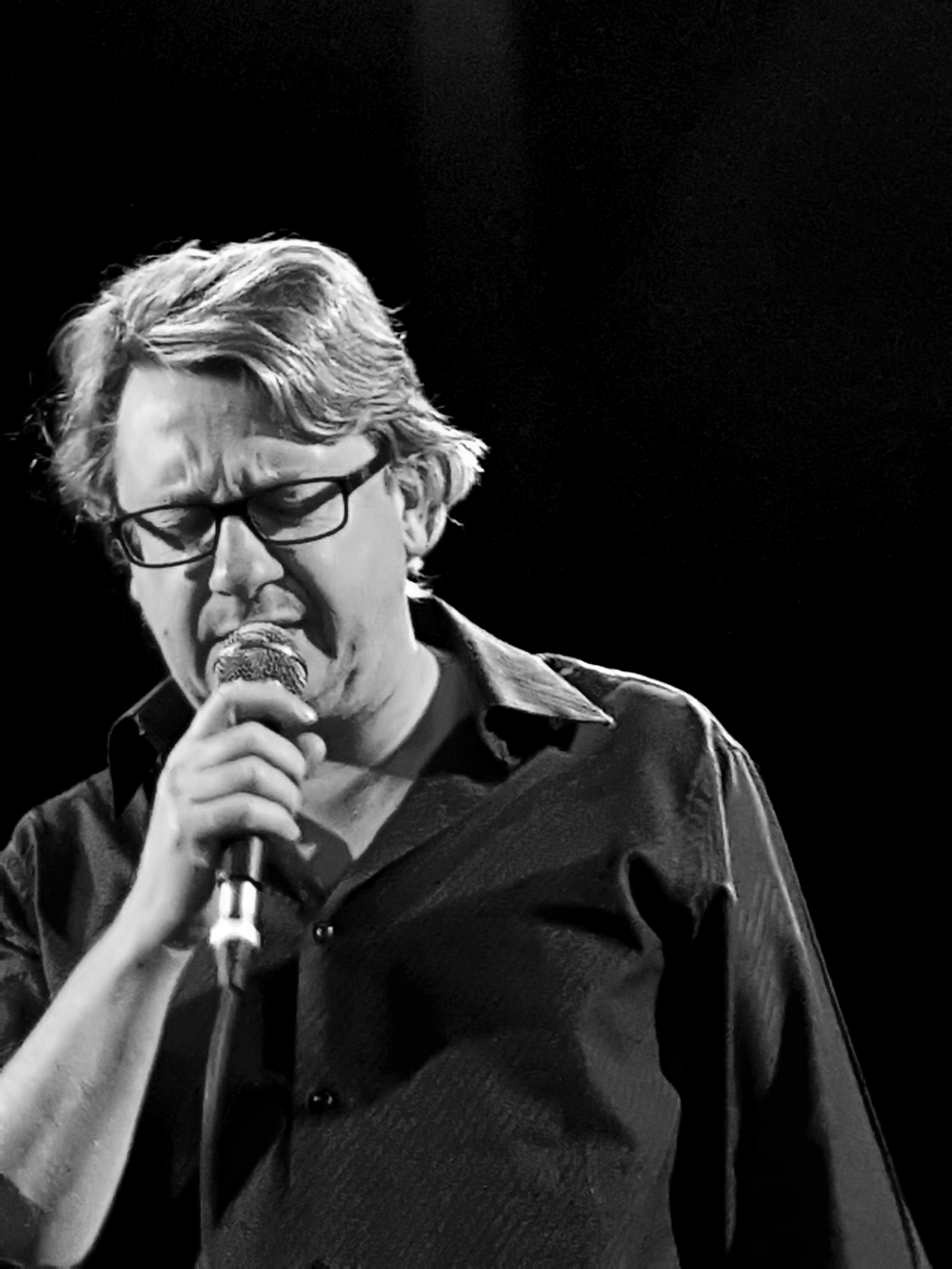 Philippe Lomprez, Trisomie 21, en concert à Strasbourg